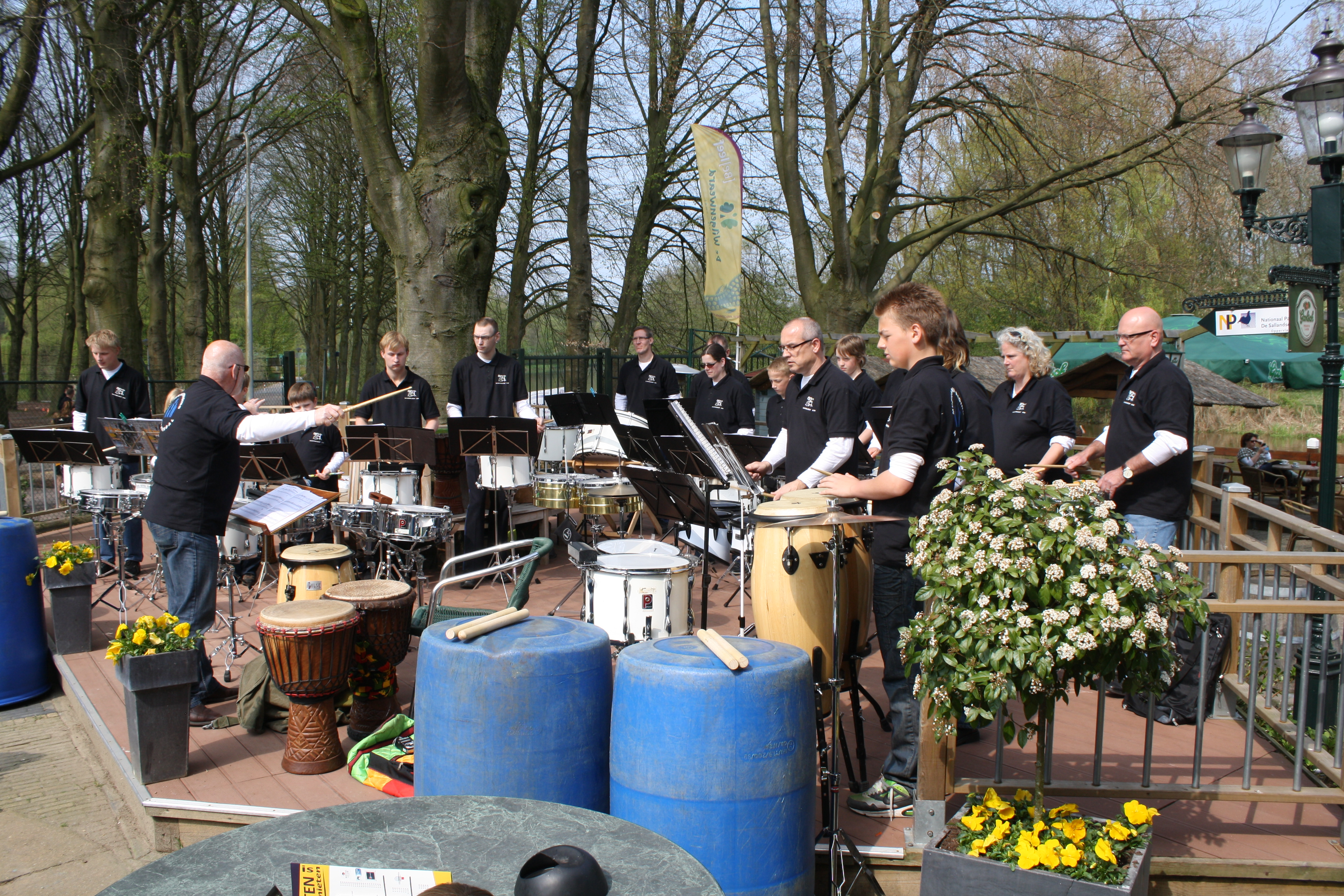 Optreden Slagwerkgroep Muziekvereniging KSW tijdens open dag Wilgenweard. Optreden + workshop waarbij bezoekers mee konden spelen en korte slagwerkinstructie kregen.